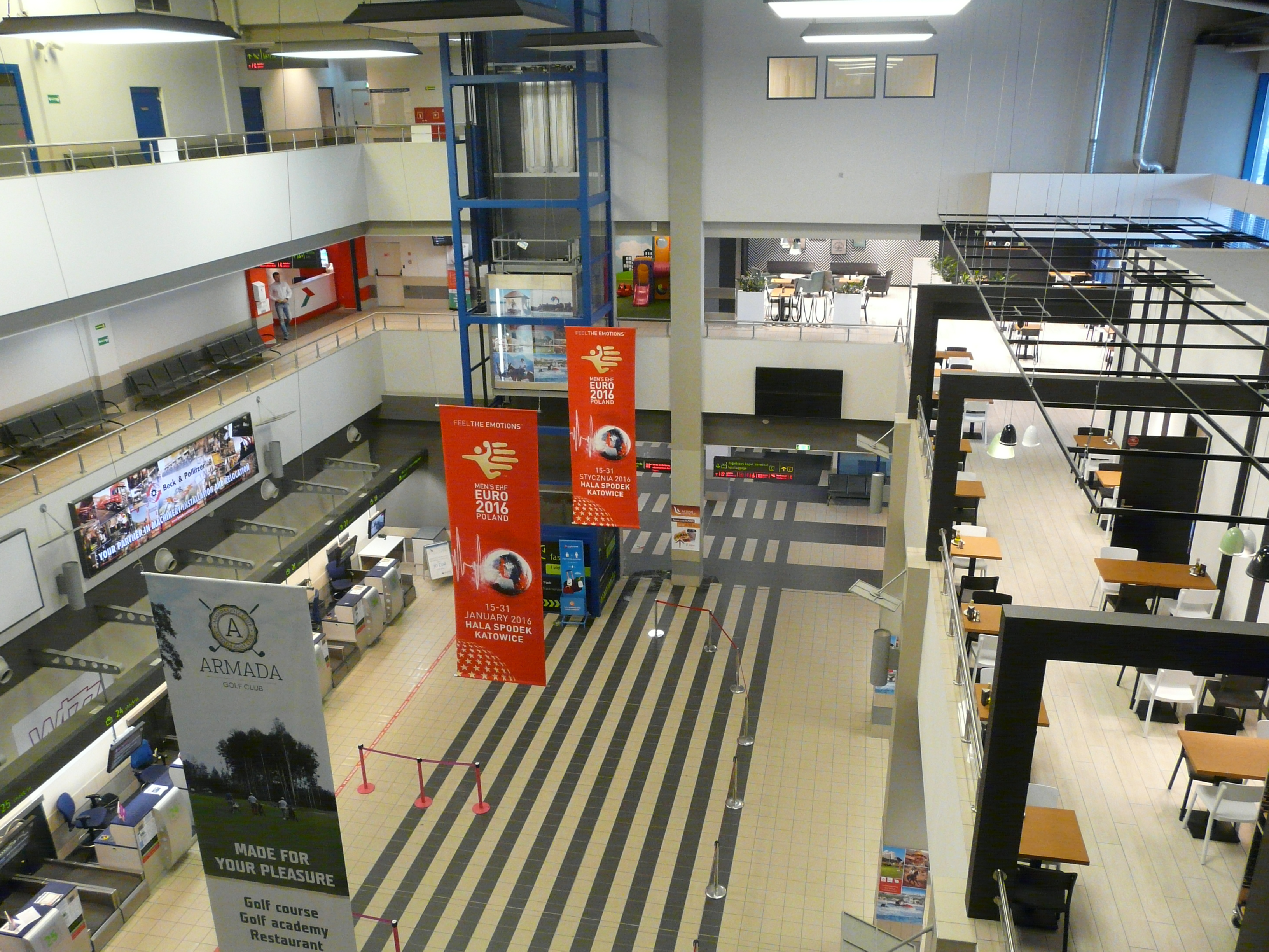 Katowice 2016